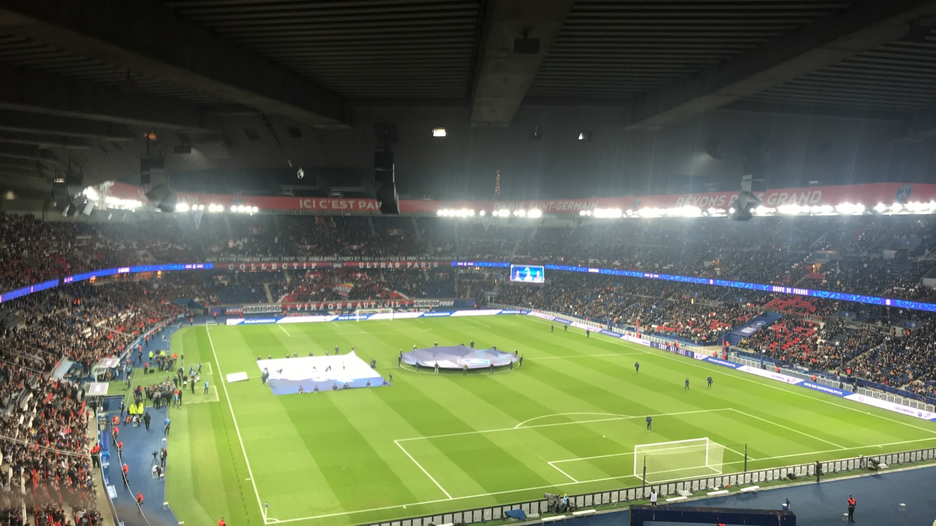 Parc des Princes